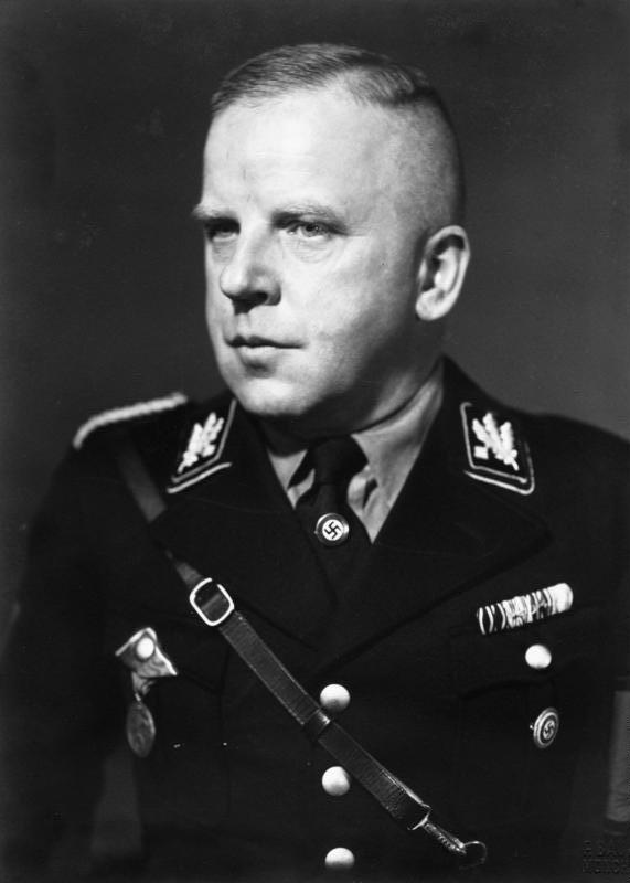 Max Amann, Reichsleiter Präsident der Reichspressekammer